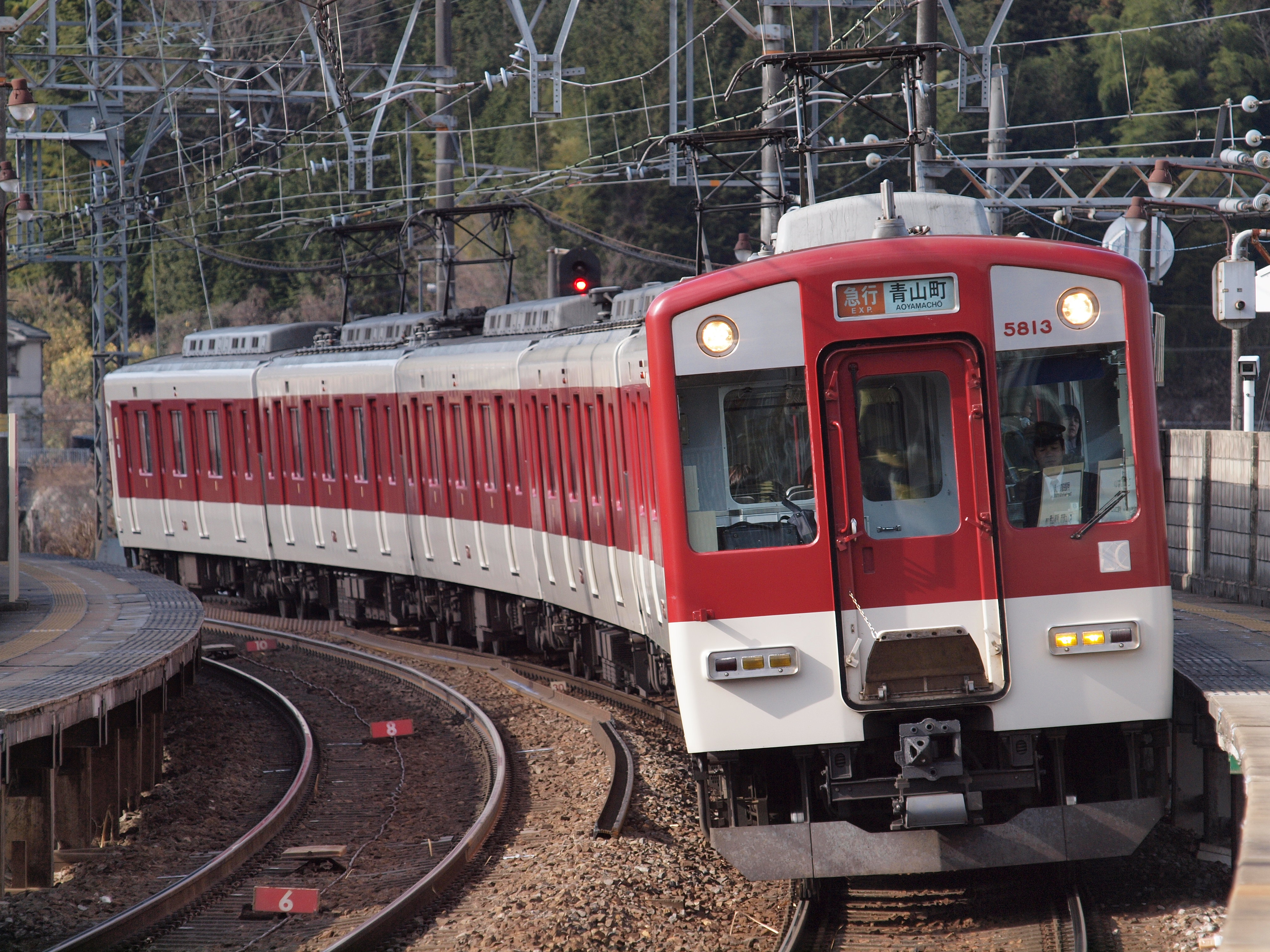 Kintetsu type 5800 近鉄5800系電車